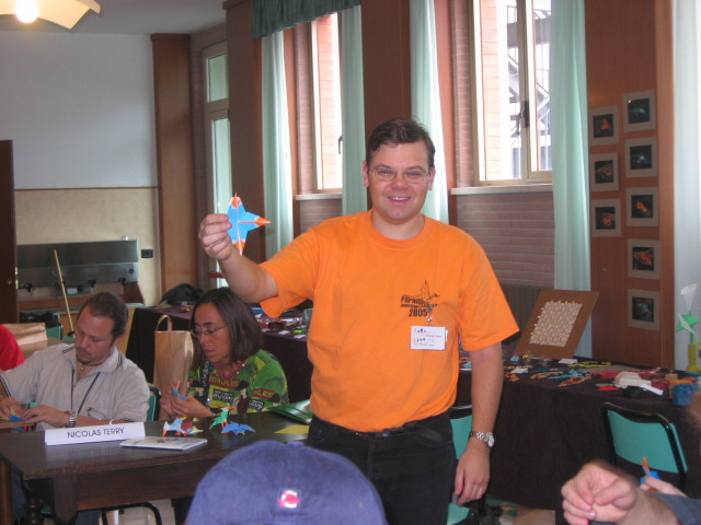 Foto hecha a Nicolas Terry cuando estaba en Barcelona.